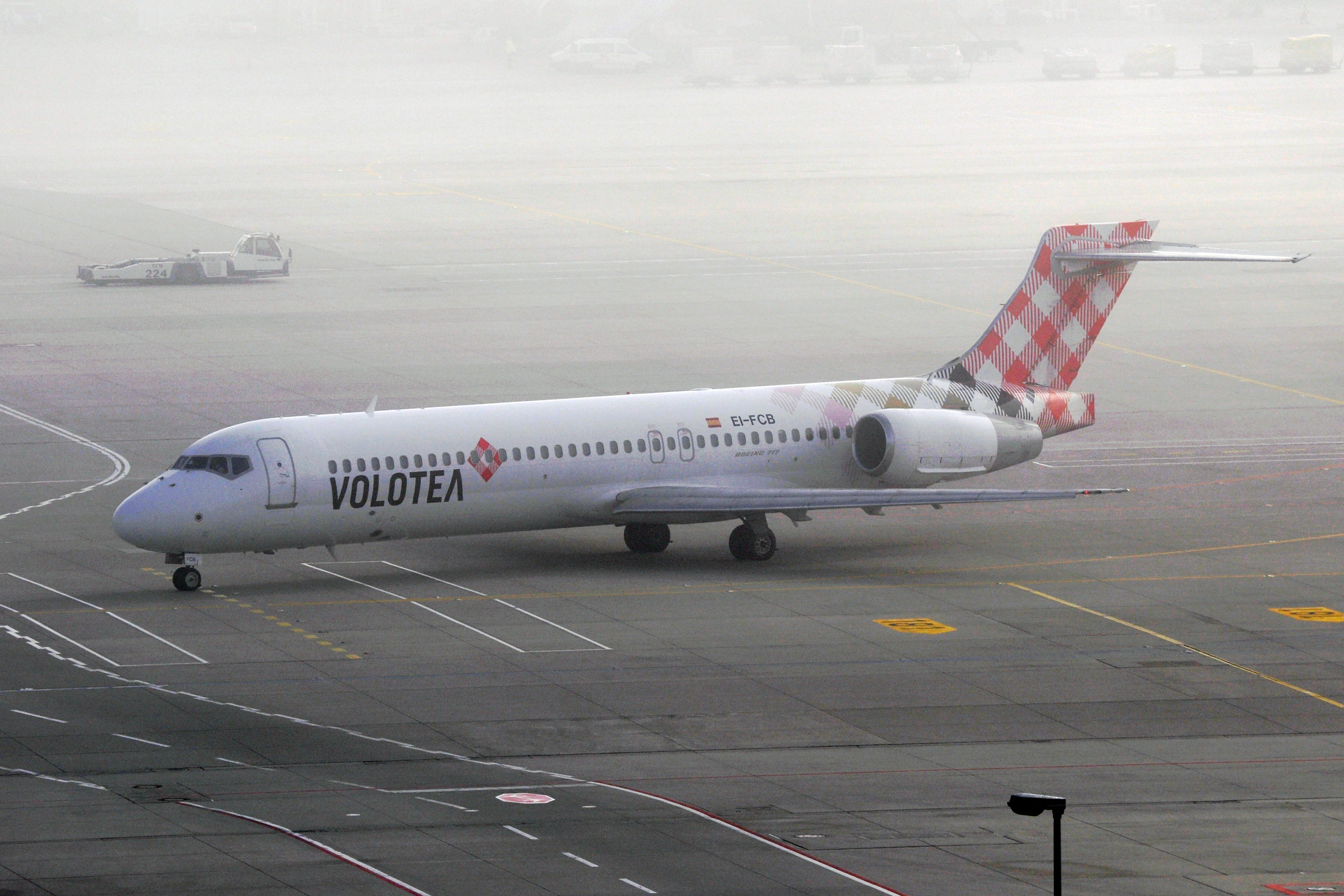 MSN 55191 LN 5151 B717-2BL VOLOTEA AIRLINES MUC EX MIDWEST AIRLINES AND CLICK MEXICANA AS N925ME